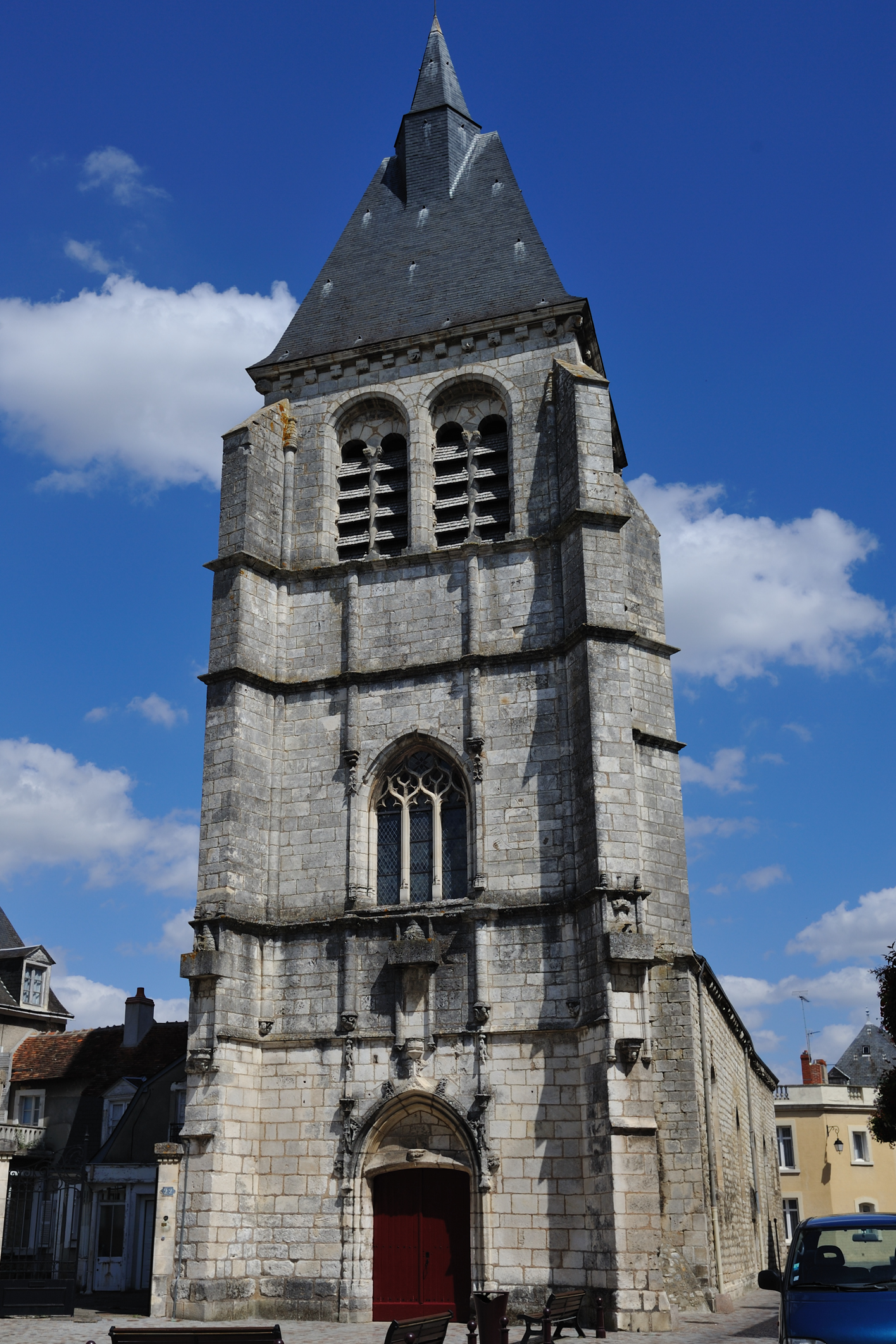 Église Saint-Martial, Châteauroux, Indre, France